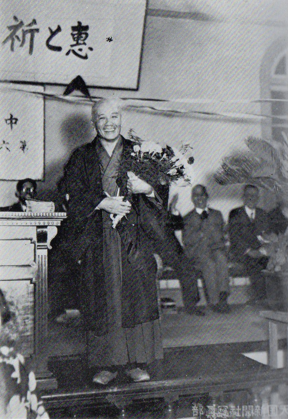 中田重治誕生会